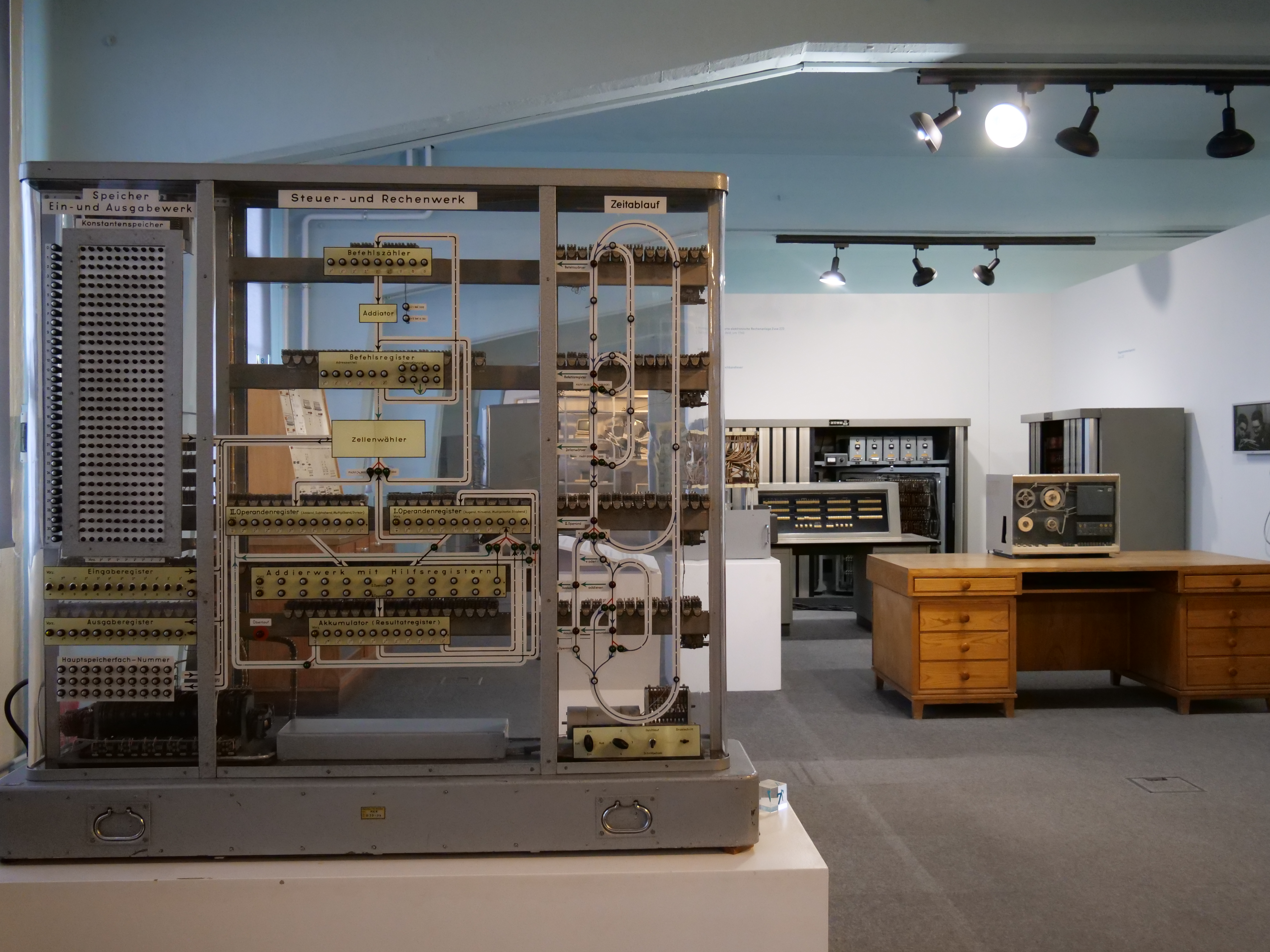 Blick in das Schaudepot Büro- und Rechentechnik der Technischen Sammlungen Dresden.